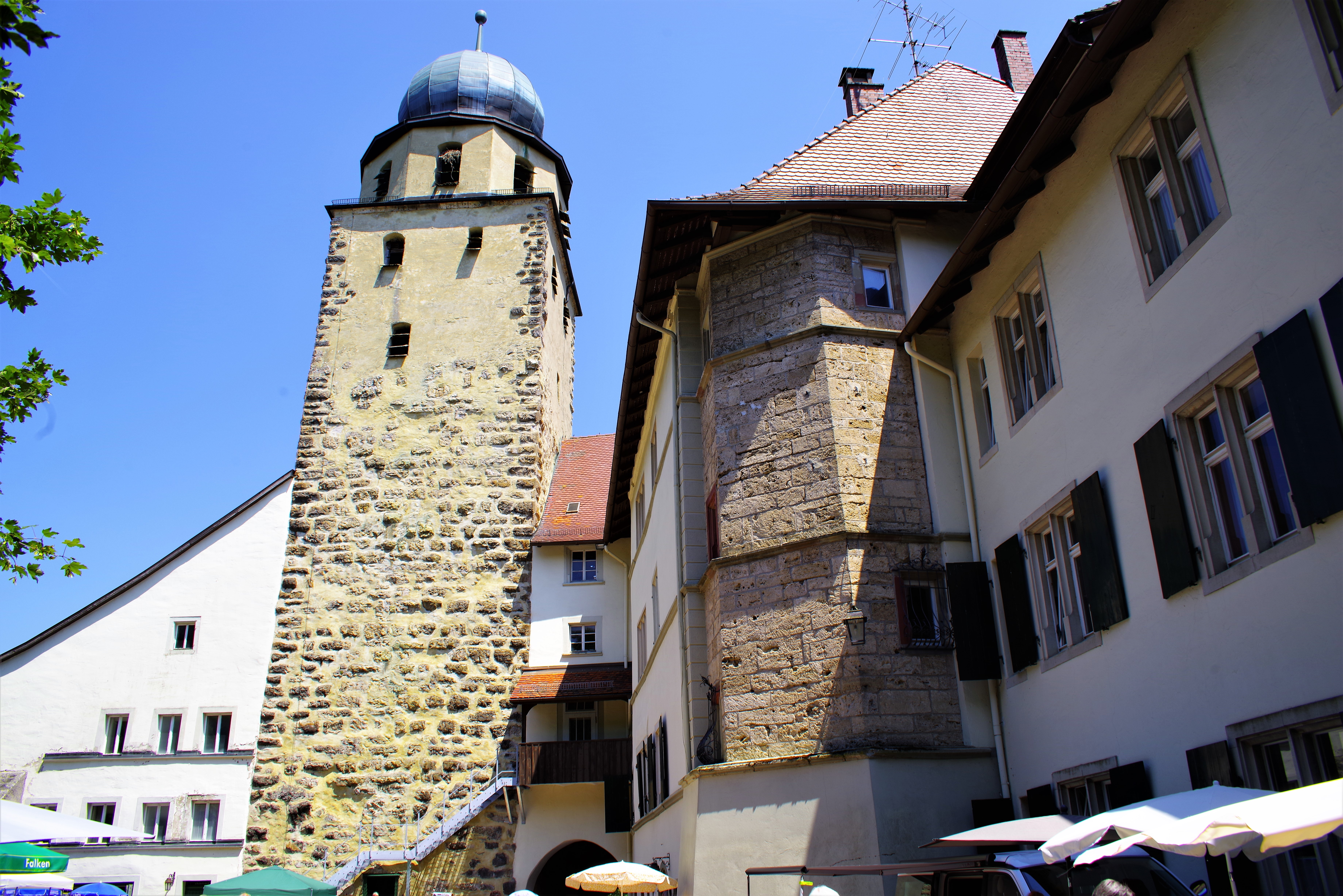 Schloss Hohenlupfen, Innenhof mit Turm und Wendelstein